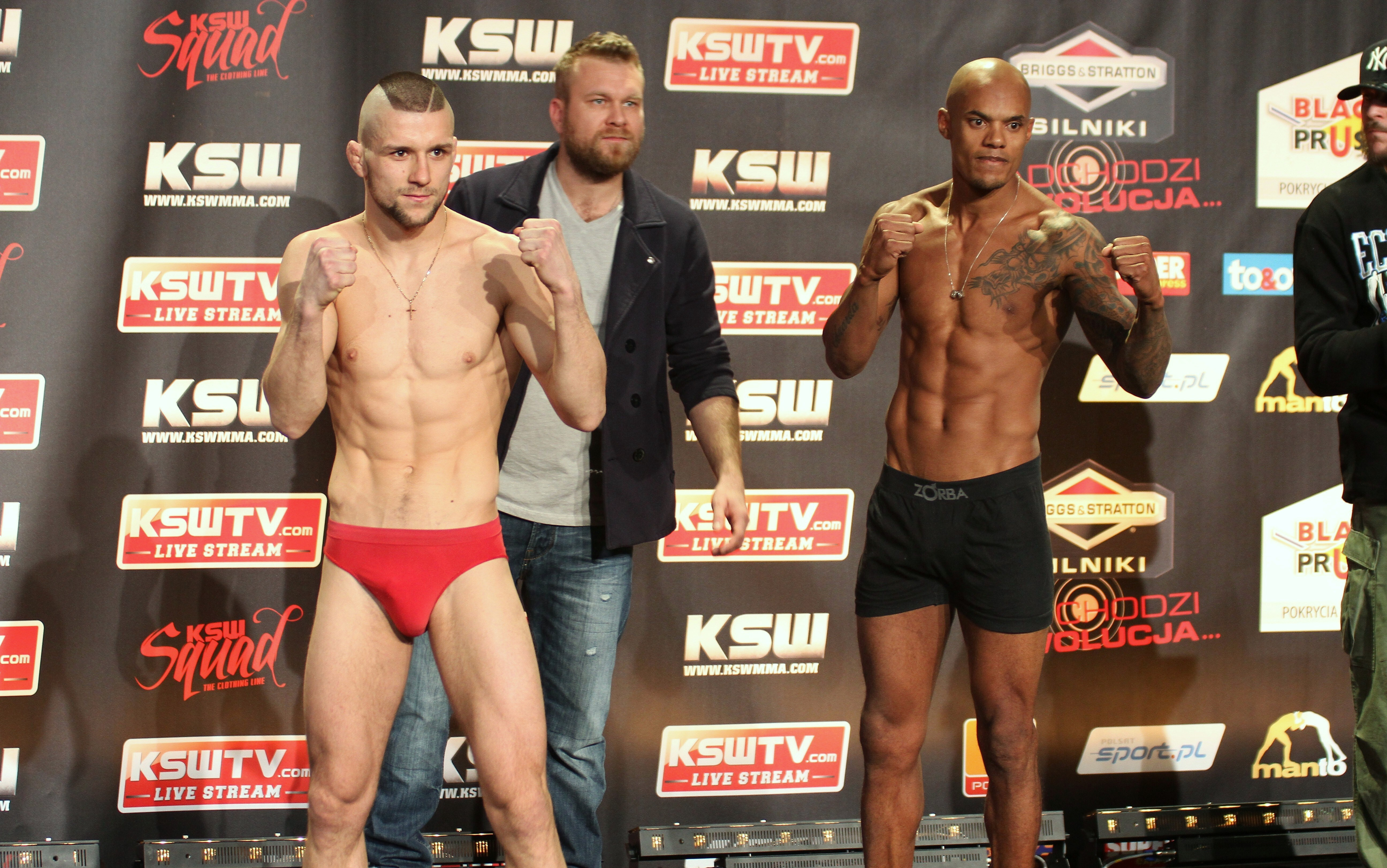 Ważenie przed galą KSW XXX w Poznaniu: Mateusz Gamrot i Rodrigo Cavalheiro, z tyłu Maciej Kawulski.